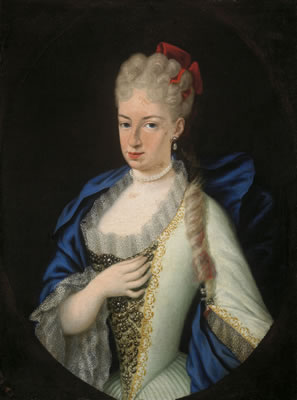 Jeronima Spínola de la Cerda, duquesa de Medinaceli, esposa de Nicolás Fernández de Córdona